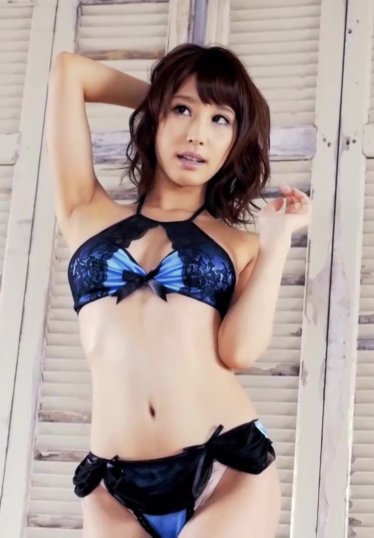 中文（香港）: 18DSC Mon Chéri藍色掛頸蕾絲比堅尼套裝 - あやみ旬果